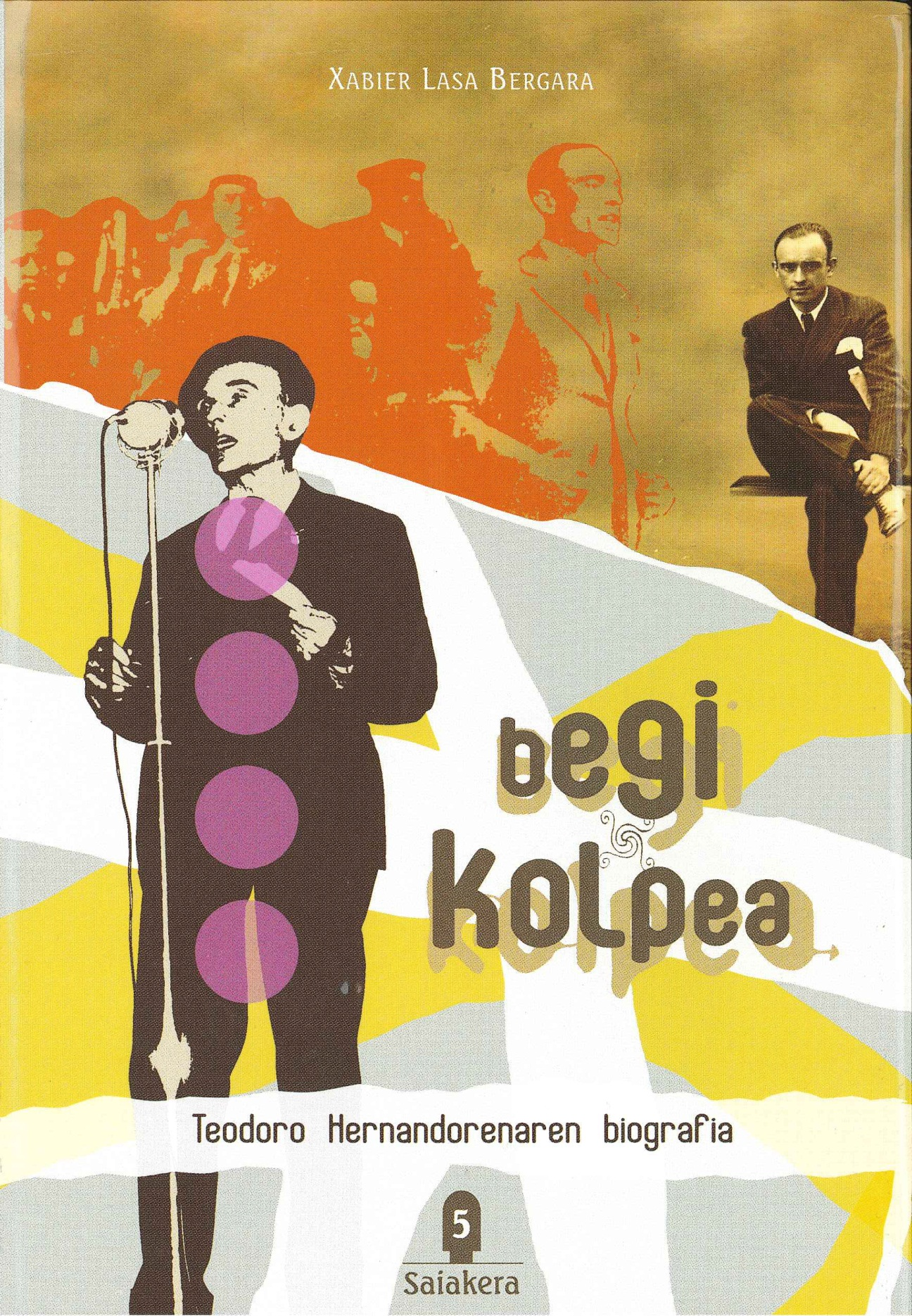 Xabier Lasak Larramendi Kultur Bazkunarekin argitara emandakoa